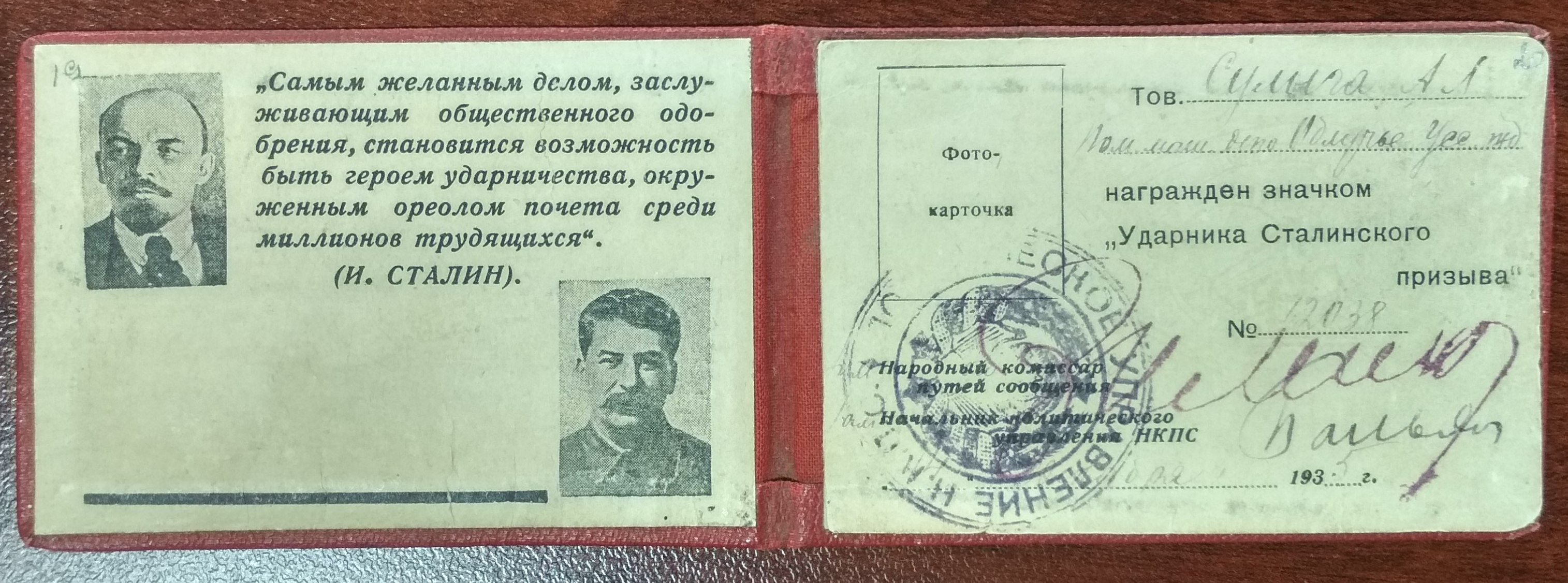 Удостоверение к нагрудный знаку “Ударнику Сталинского призыва” 1935 год. Экспозиция Благовещенского краеведческого музея